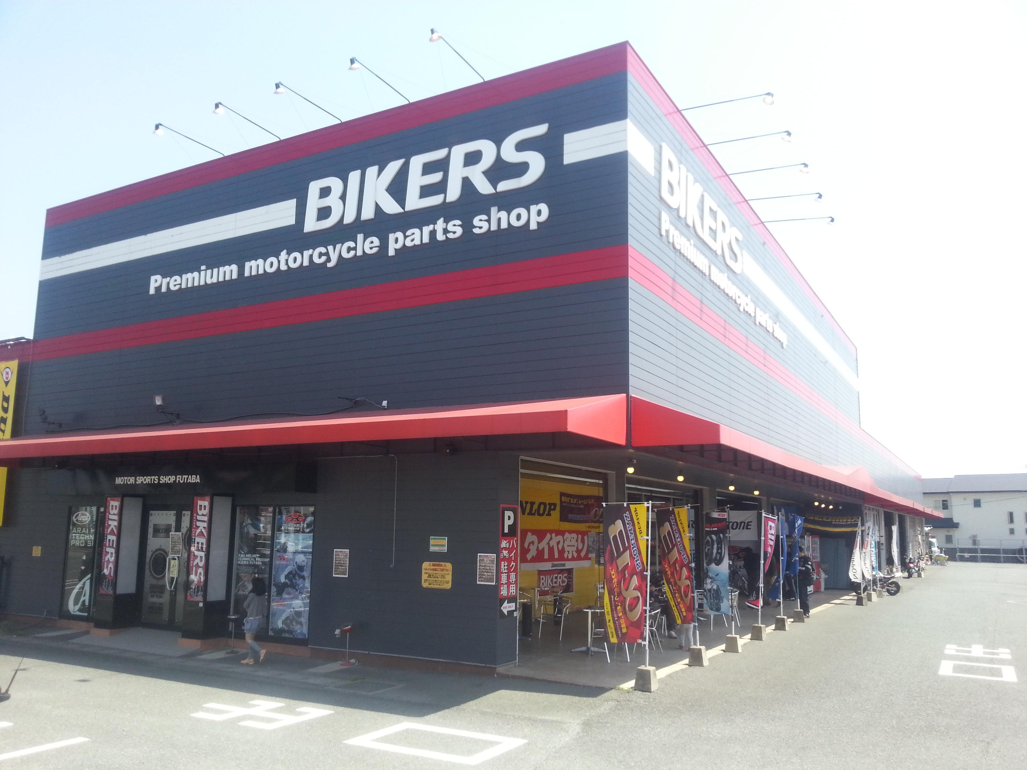 バイカーズの外観